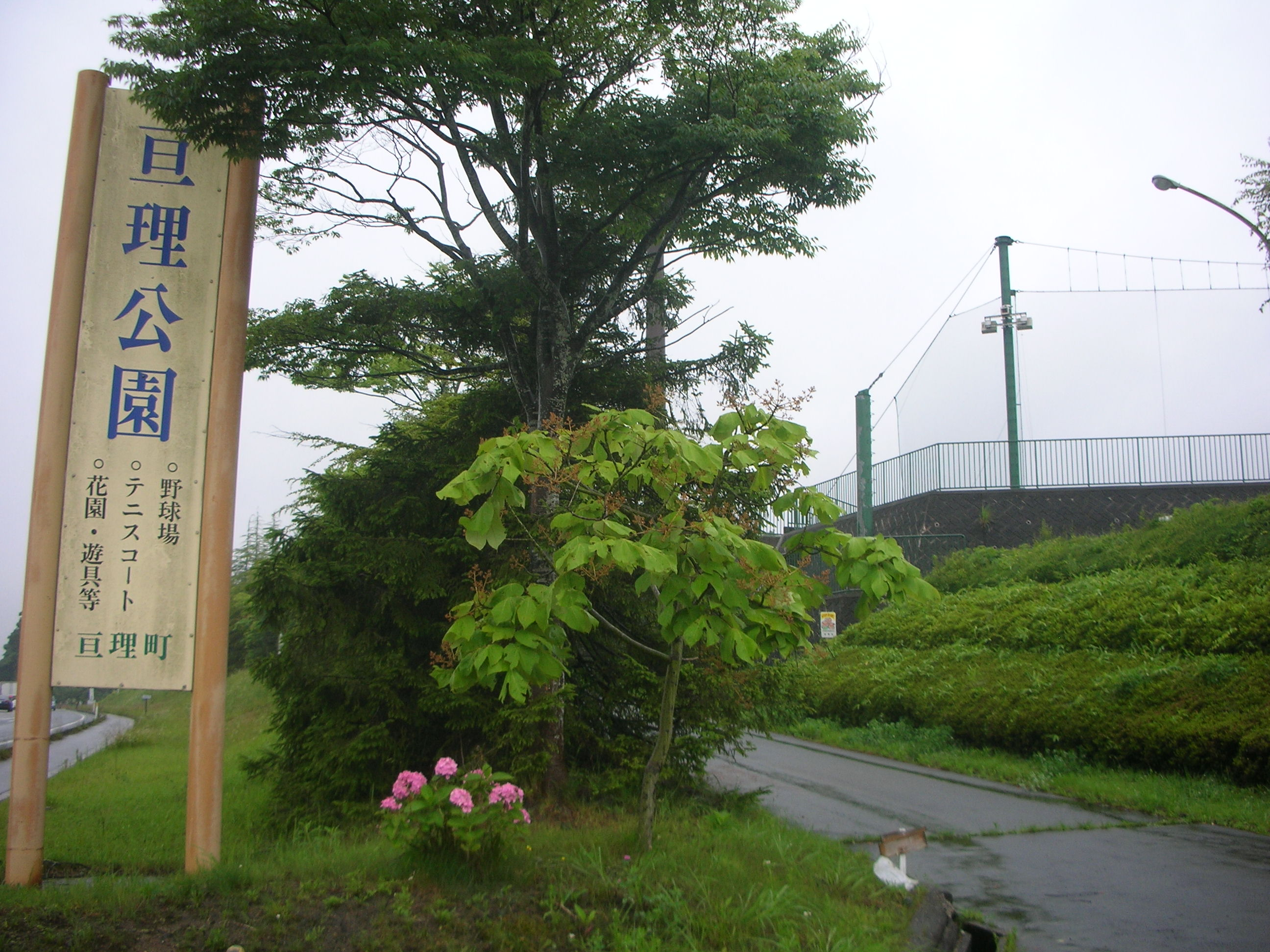 亘理町・亘理公園